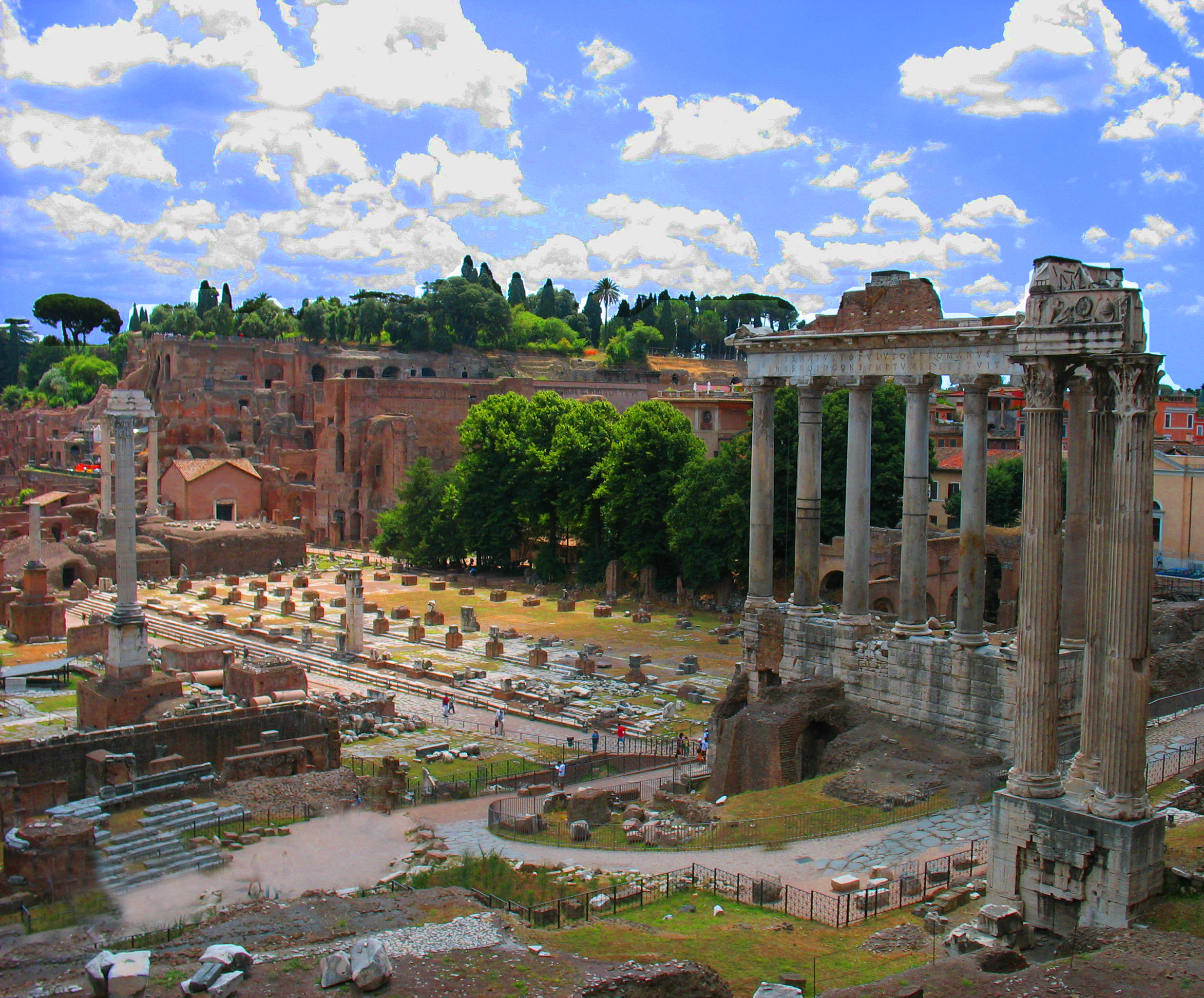 Roman Forum